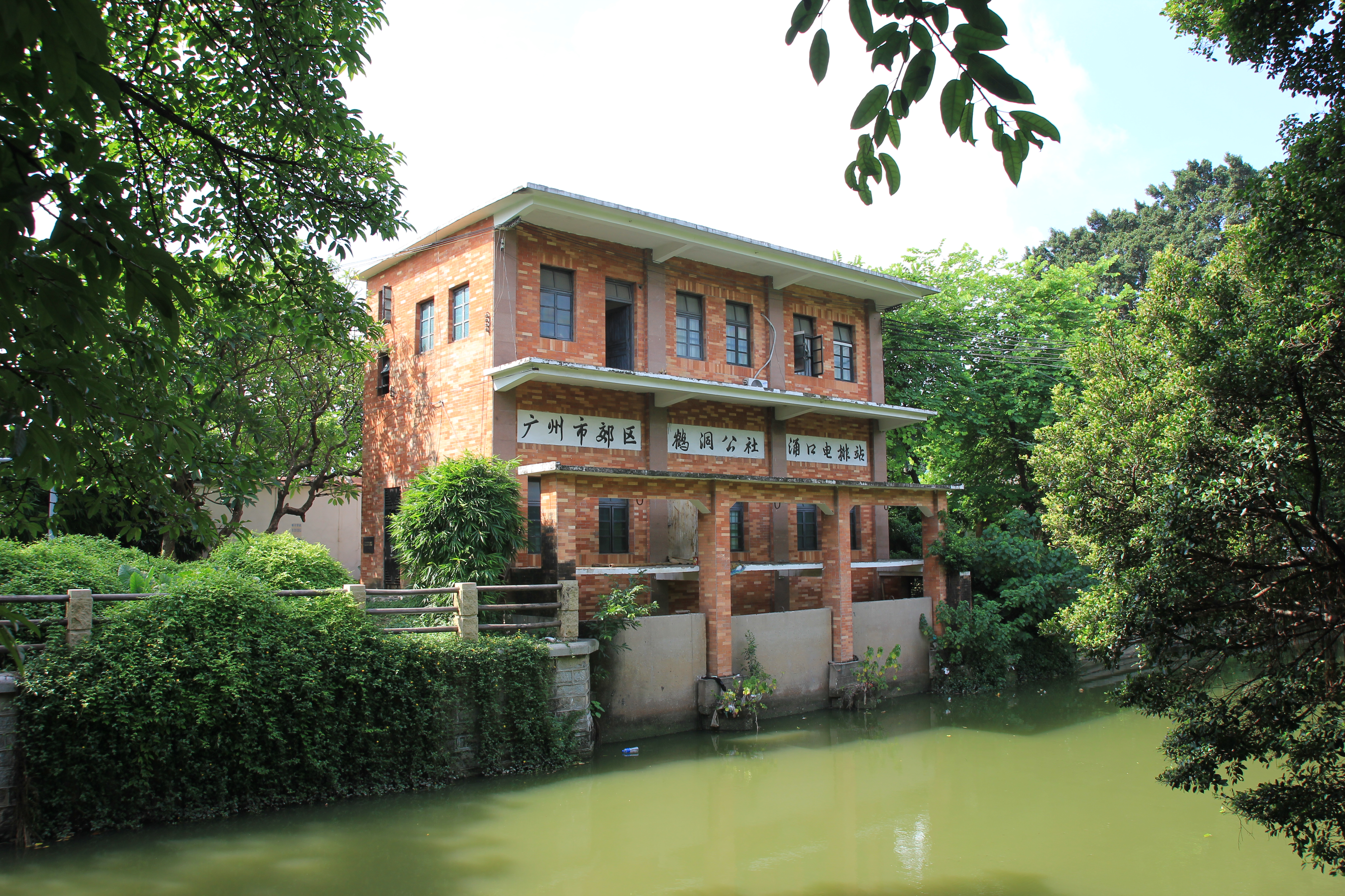 位于广州市荔湾区冲口街杏花社区芳村大道东堤岸东街毓灵桥旁。建于1958年。2011年12月公布为荔湾区登记保护文物单位。